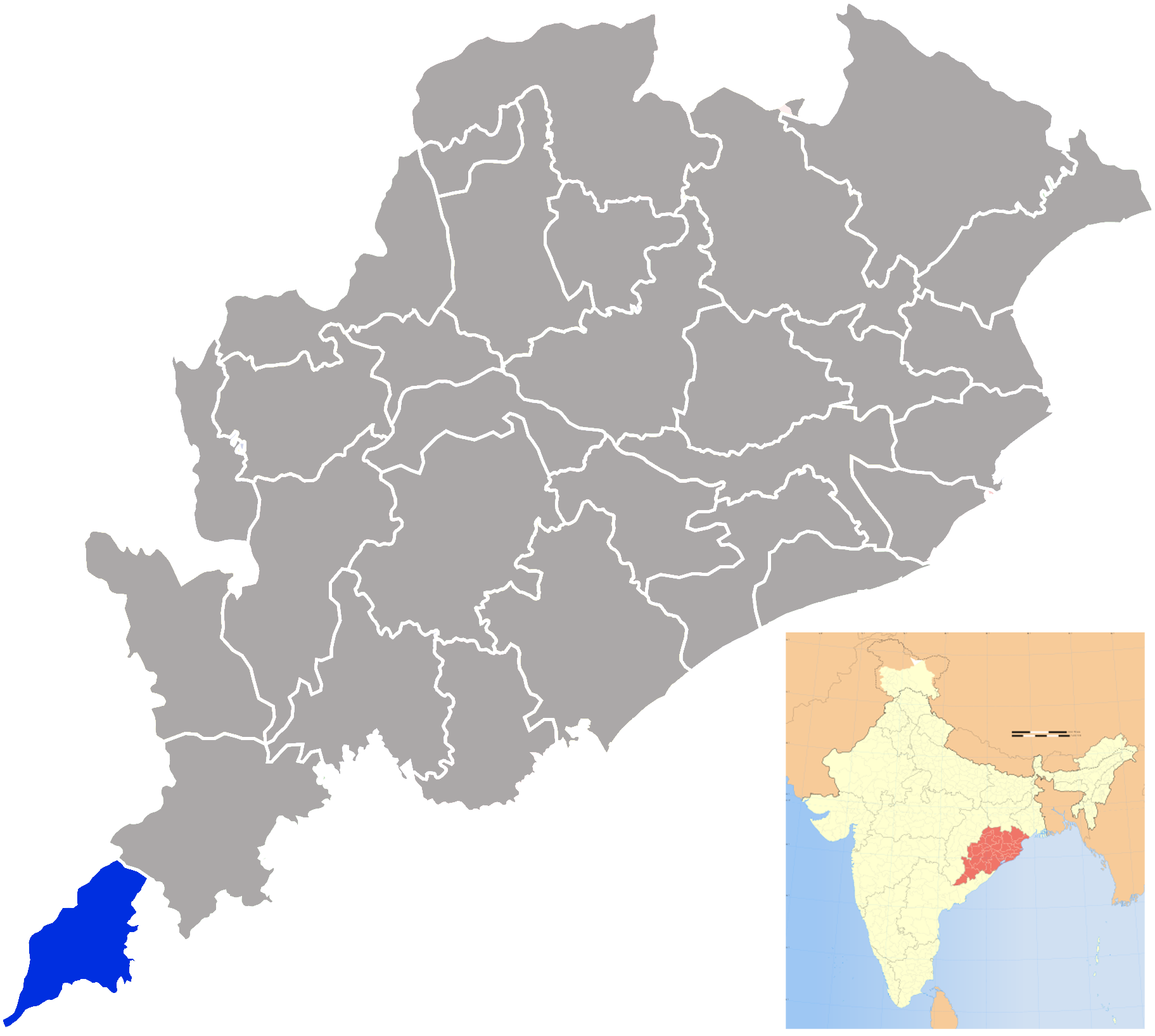 Distrito de Malkangiri en Orissa